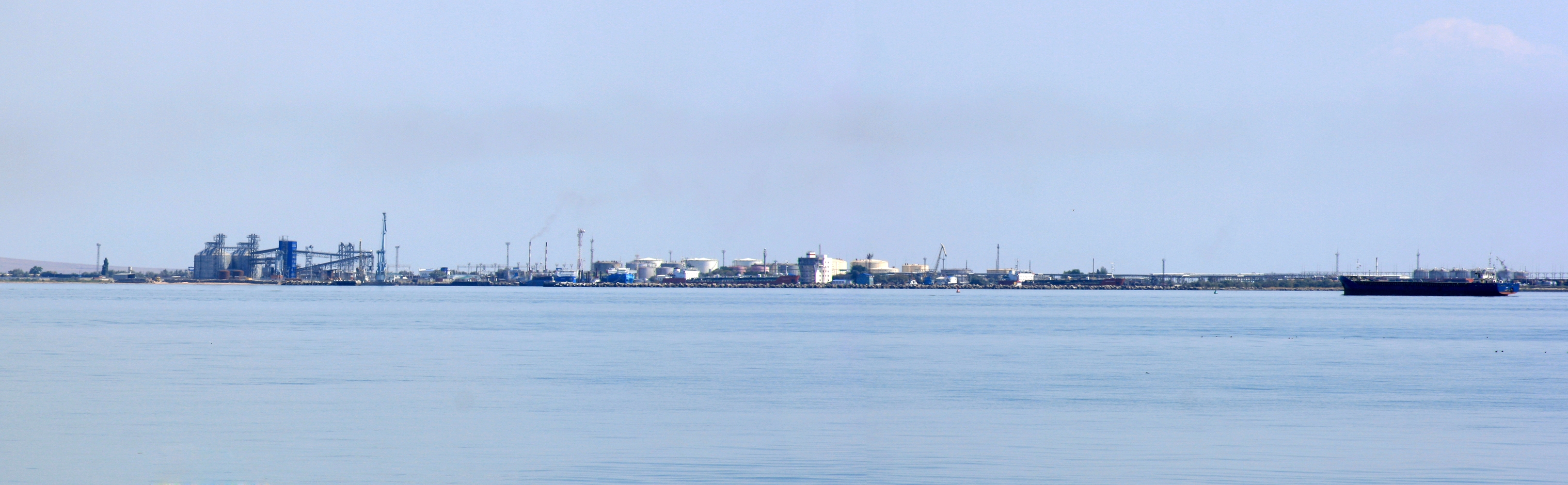 Керченский пролив, вид от крепости Ени-Кале